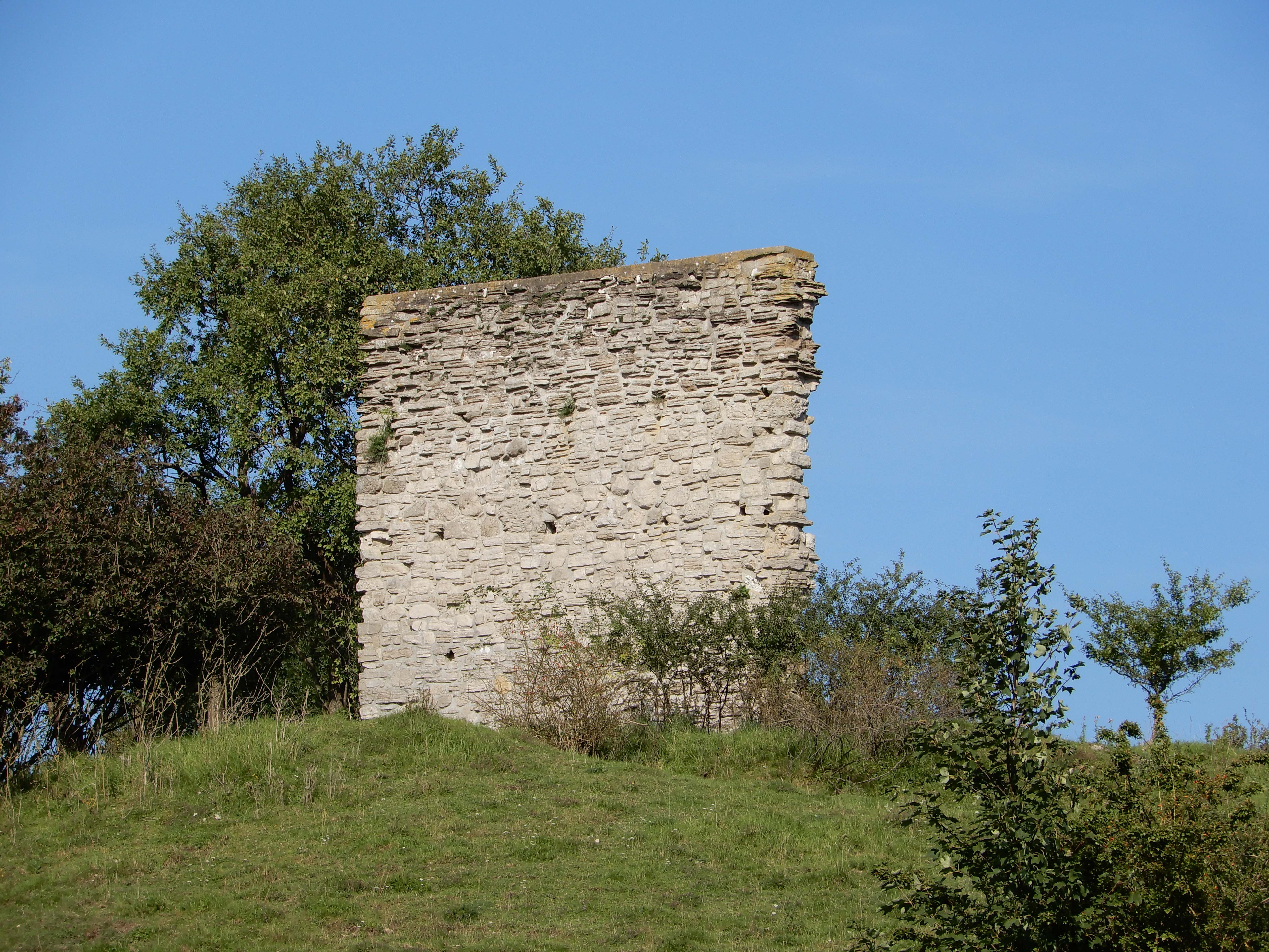 Mauerrest der Kirche, die in Möttlingerode bestand. Möttlingerode wurde wüst.